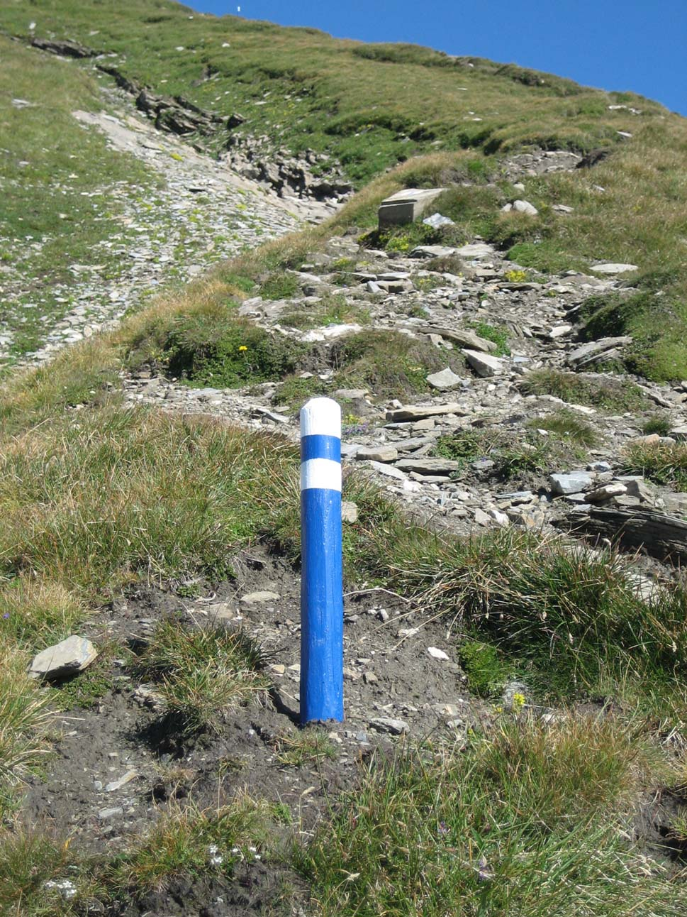 Markierung eines alpinen Wanderwegs am Piz Uccello, San Bernardino GR